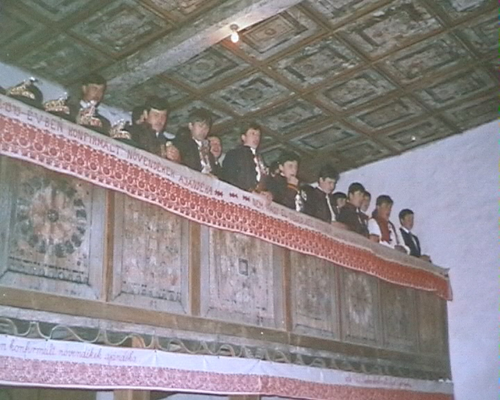 Magyarvistai templombelső